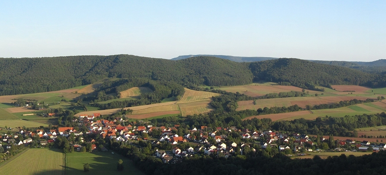 Blick vom großen Leuchtberg nach Niederdünzebach (dahinter der Schlierbachswald mit dem Hohen Rain links und dem Bonzaberg rechts, im Hintergrund der Ringgau mit dem Heldrastein)